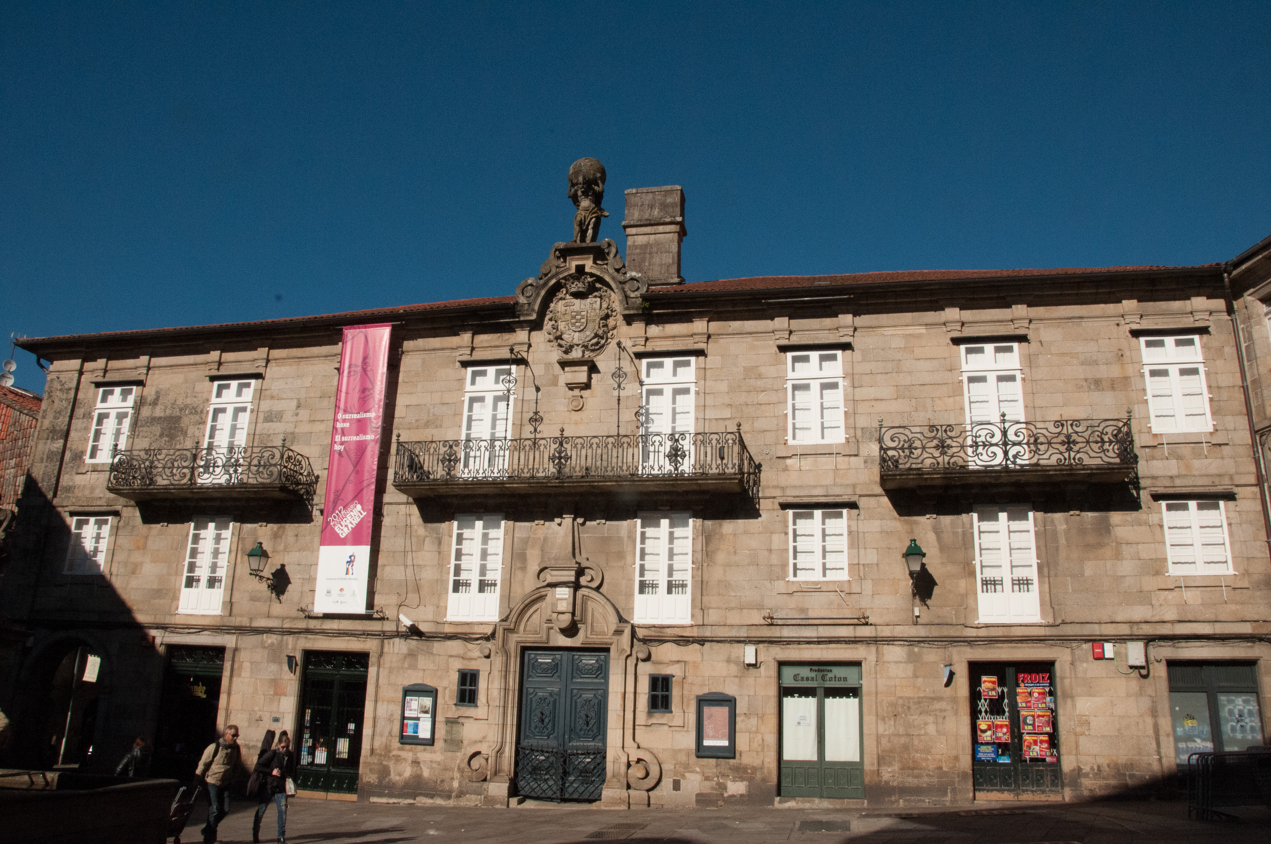 Santiago de Compostela, Spain-24. Pazo dos Marqueses de Bendaña (Eugenio Granell Foundation Museum)